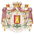 le blason de la Maison de Castellane